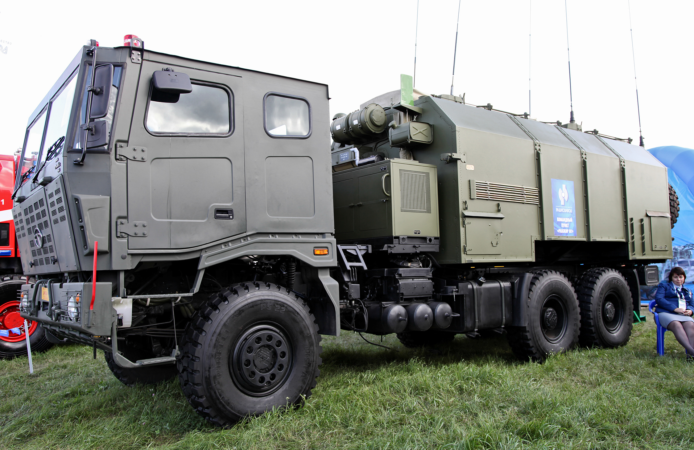 Унифицированный командный пункт 9С737МК Ранжир-М1 на шасси ТАТА (9S737MK Ranzhir-M1 unified command post on TATA chassis)